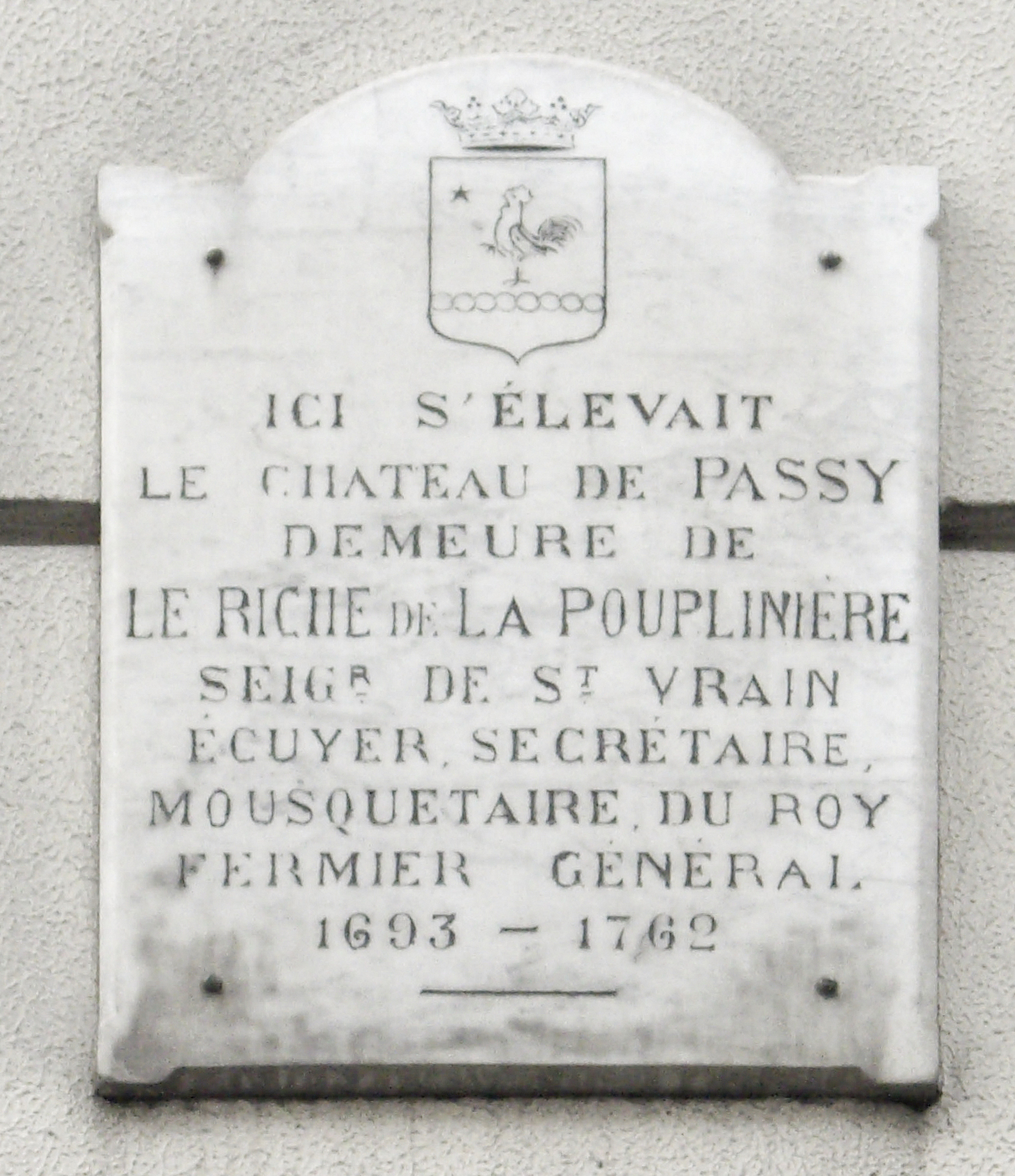 Plaque commémorative, 2 rue des Marronniers, Paris 16e. « Ici s'élevait le château de Passy, demeure de Le Riche de La Pouplinière, Seigneur de Saint-Vrain, écuyer, secrétaire, mousquetaire du roy, fermier général, 1693-1762. » Armoiries : Un écu de gueules à un coq d'argent crété, becqué, barbé et onglé de même, posé sur une chaîne d'or, posée en fasce, ayant la patte droite levée et regardant une étoile d'or posée à l'angle dextre du chef de l'écu.